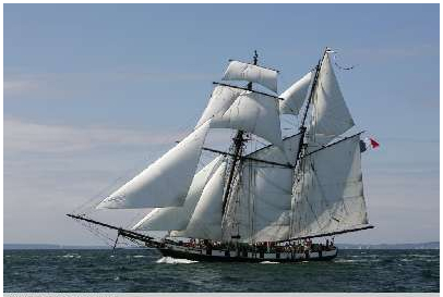 Goélette française "La Recouvrance"